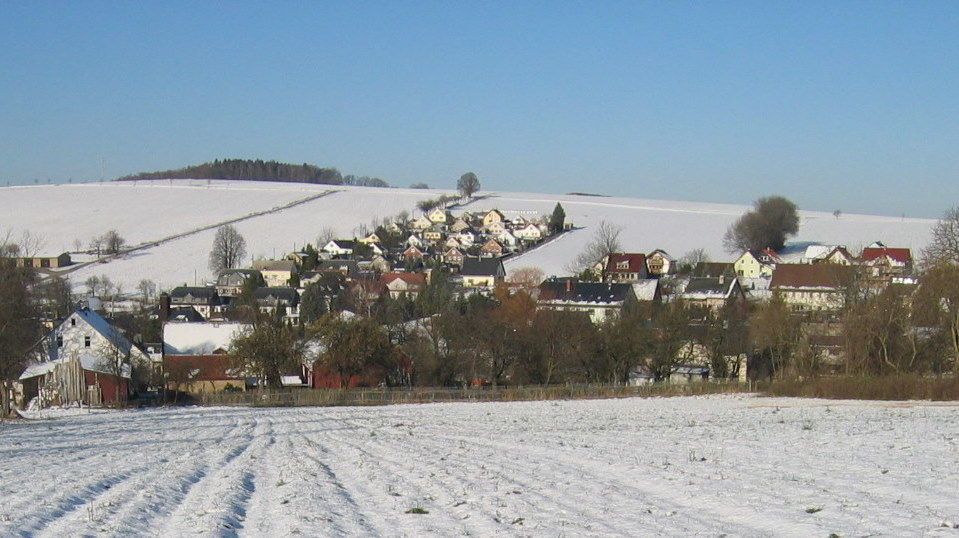 Blick über Leubsdorf Richtung Siedlung im Winter